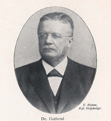 Karl Gutbrod (1844-1905), deutscher Jurist, Präsident des Reichsgerichts.